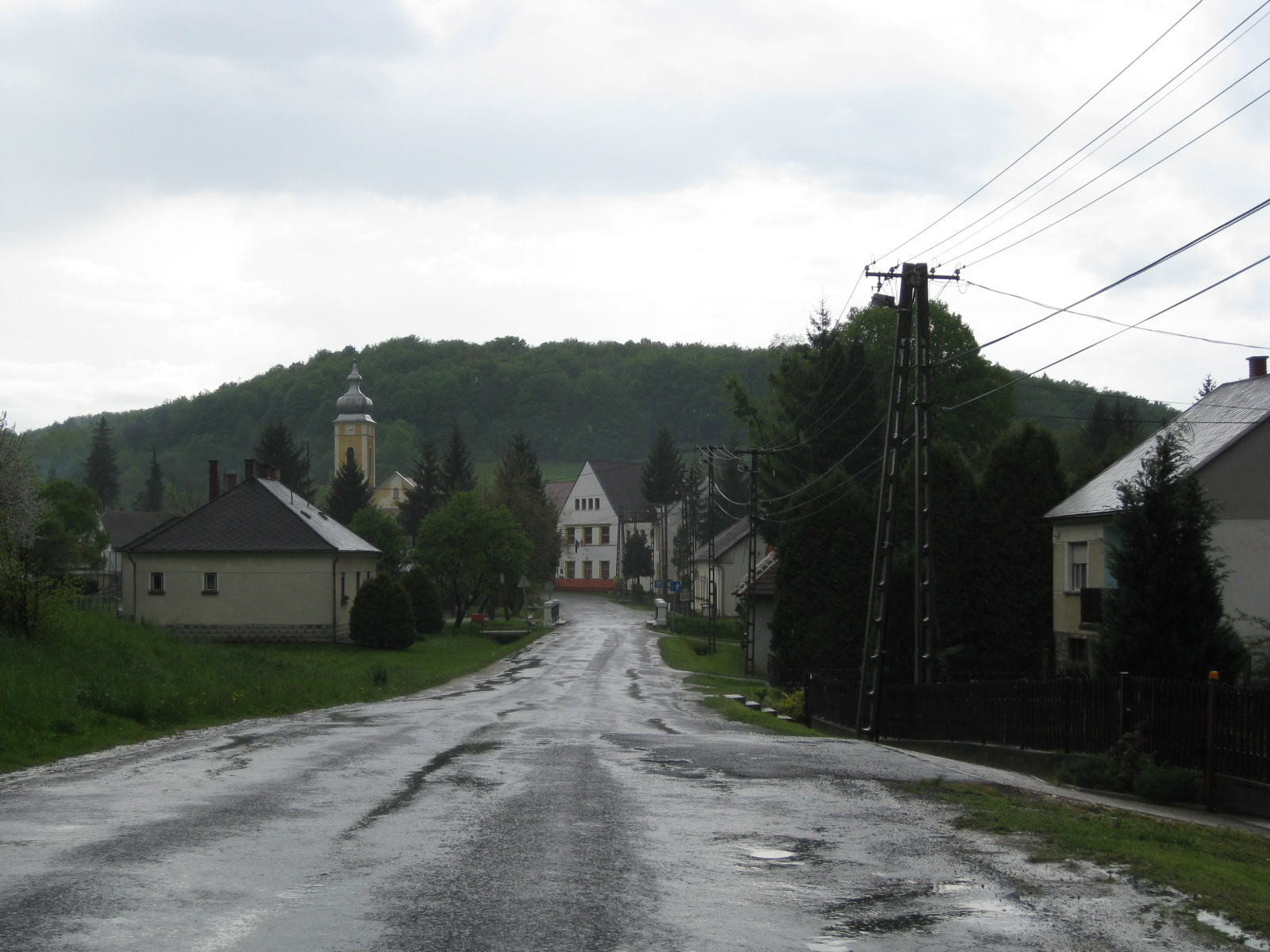 Gornji Senik (slovenian name), village in Hungary, Felsőszölnök a 7454-es műúton.